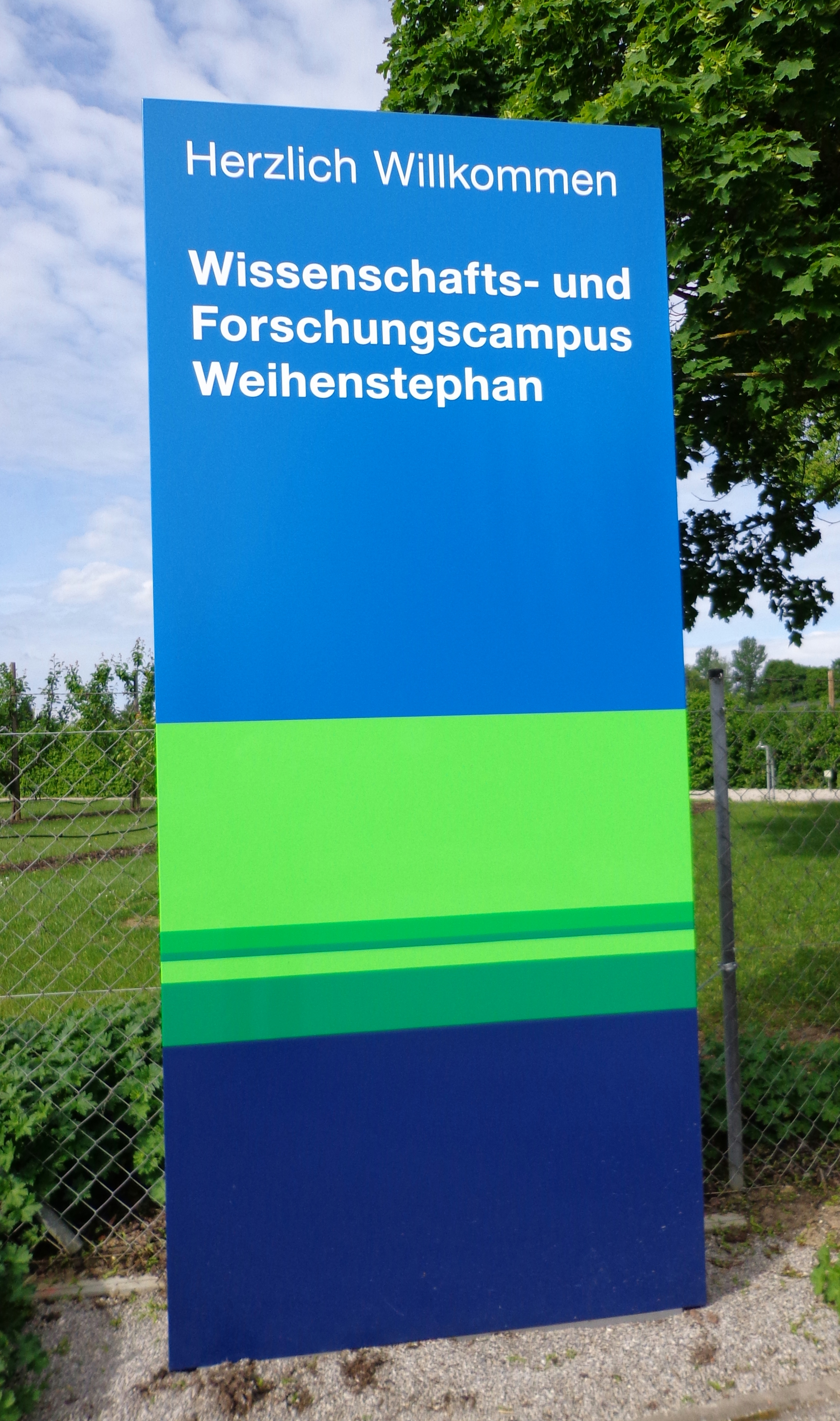 Hinweisschild am Campus Freising-Weihenstephan